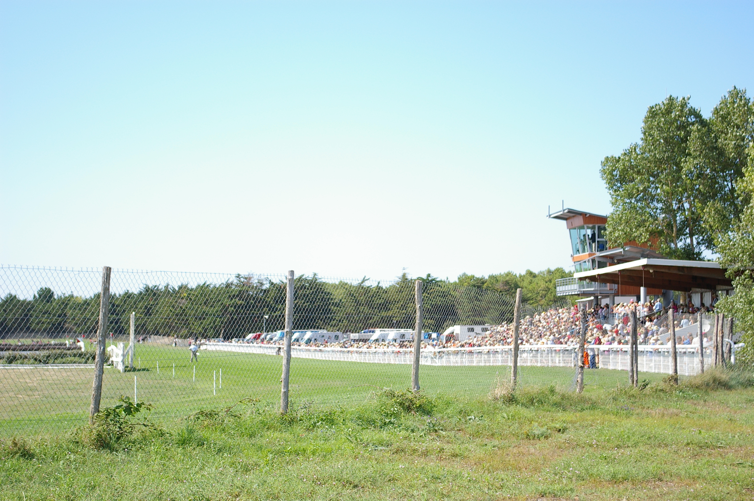 Vue de l'hippodrome de l'atlantique Licensing Je suis l'auteur de cette photographie --Clicgauche 16 décembre 2006 à 16:37 (CET)